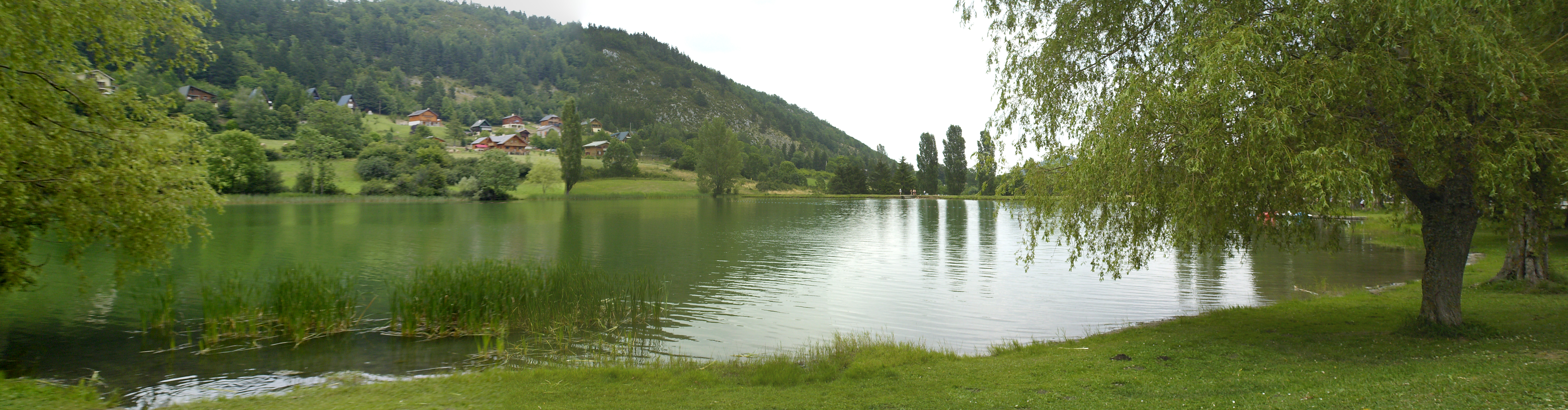 Le lac de Belcaire dans l'Aude